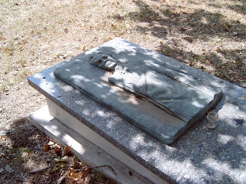 Rajk László (Székelyudvarhely, 1909. márc. 8. – Bp., 1949. okt. 15.): politikus, miniszter sírja Budapesten. Kerepesi temető: 11-10-4/a [szobrász: Varga Imre].